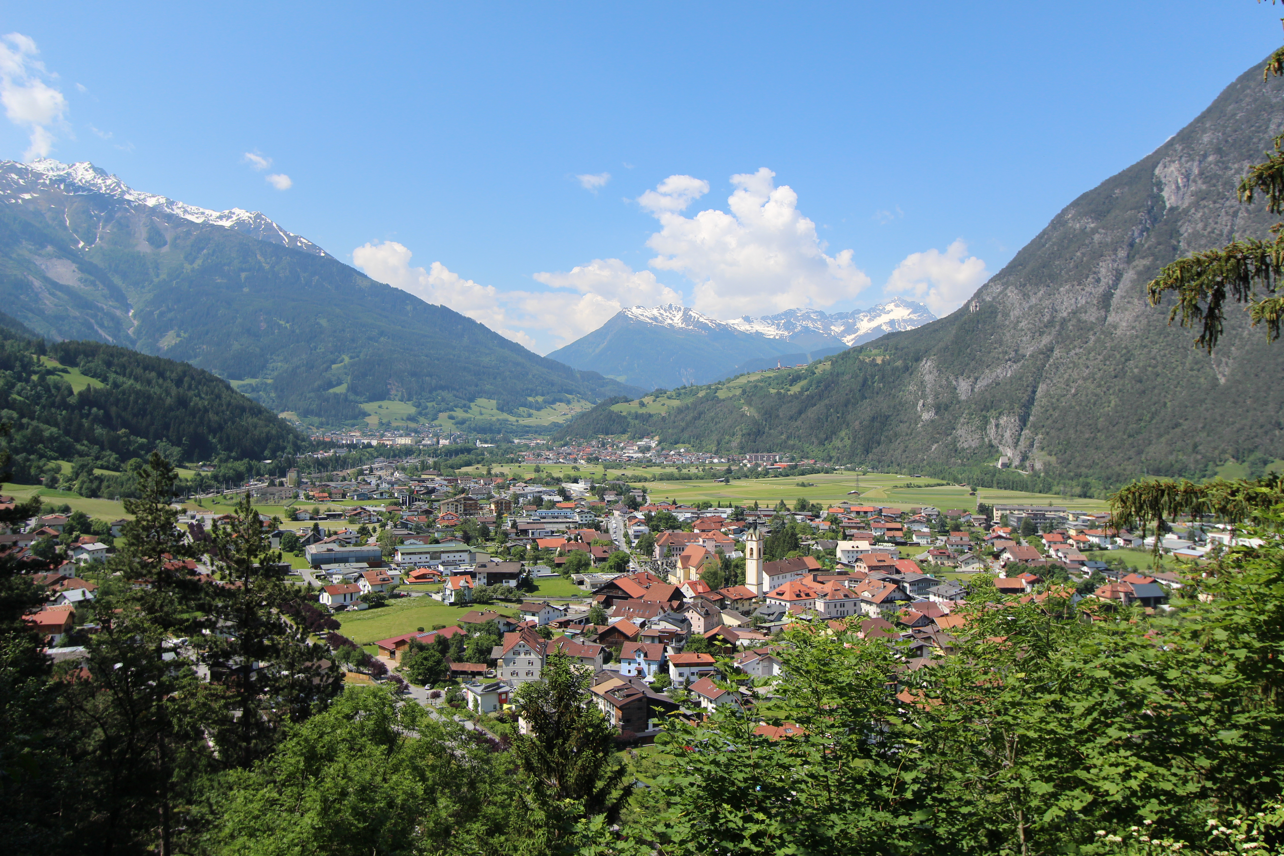 Ortsansicht von Zams von Nordosten